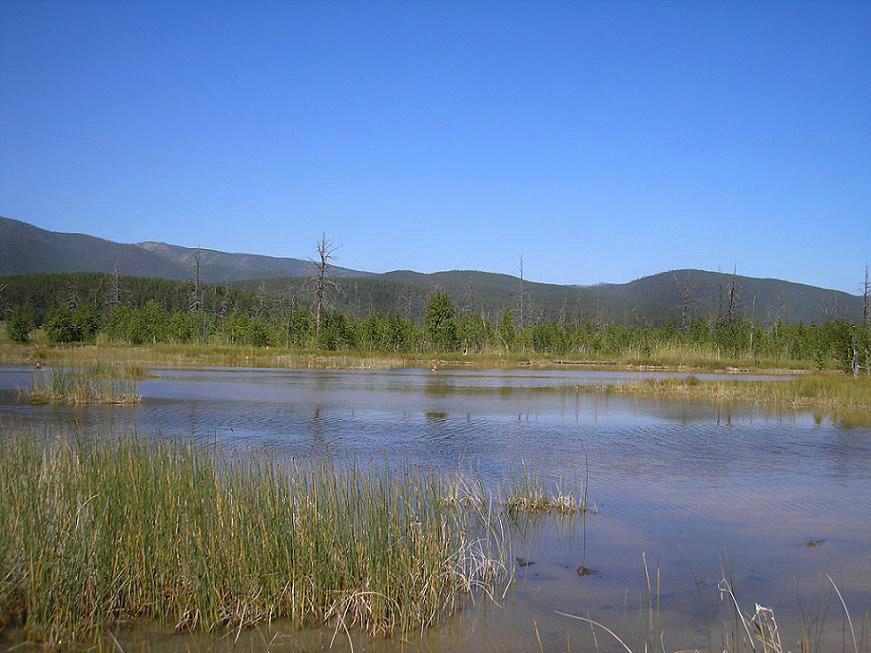 Кулиные болота